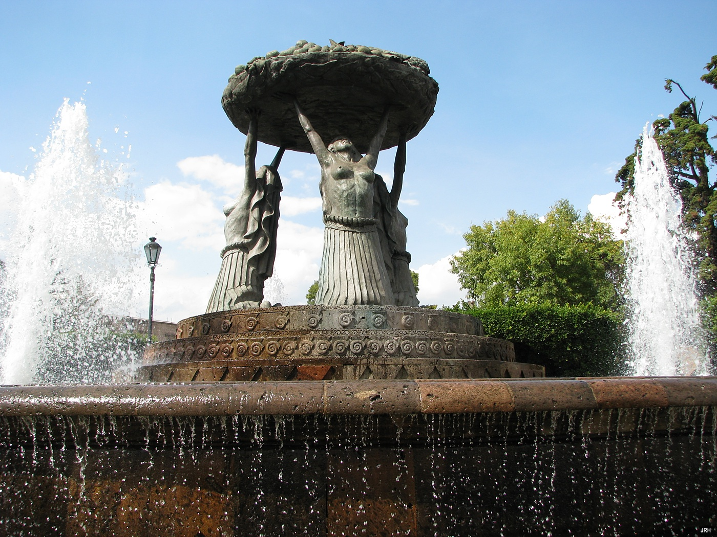 Fuente Las Tarascas. Nāhuatl: Ameyalli Las Tarascas.